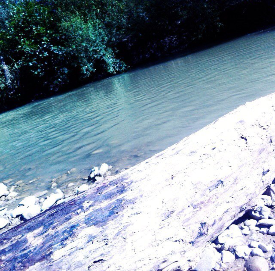 Река Фарс у станицы Махошевской